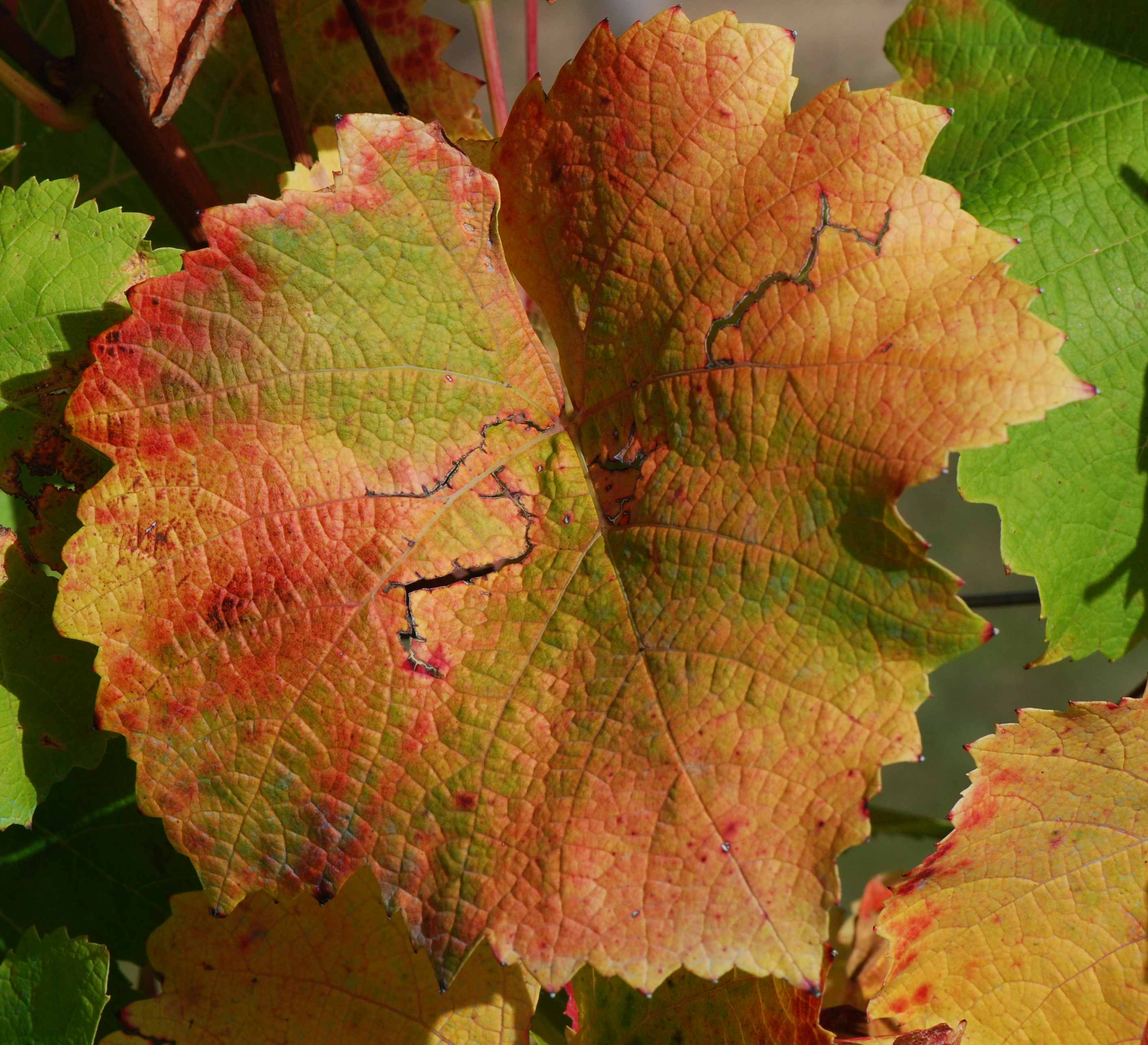 Fer servadou, feuille, Conservatoire du vignoble charentais, Cherves 17